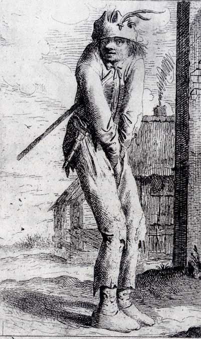 Vagabond